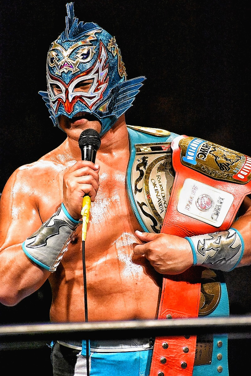 プロレスラーのグルクンマスク